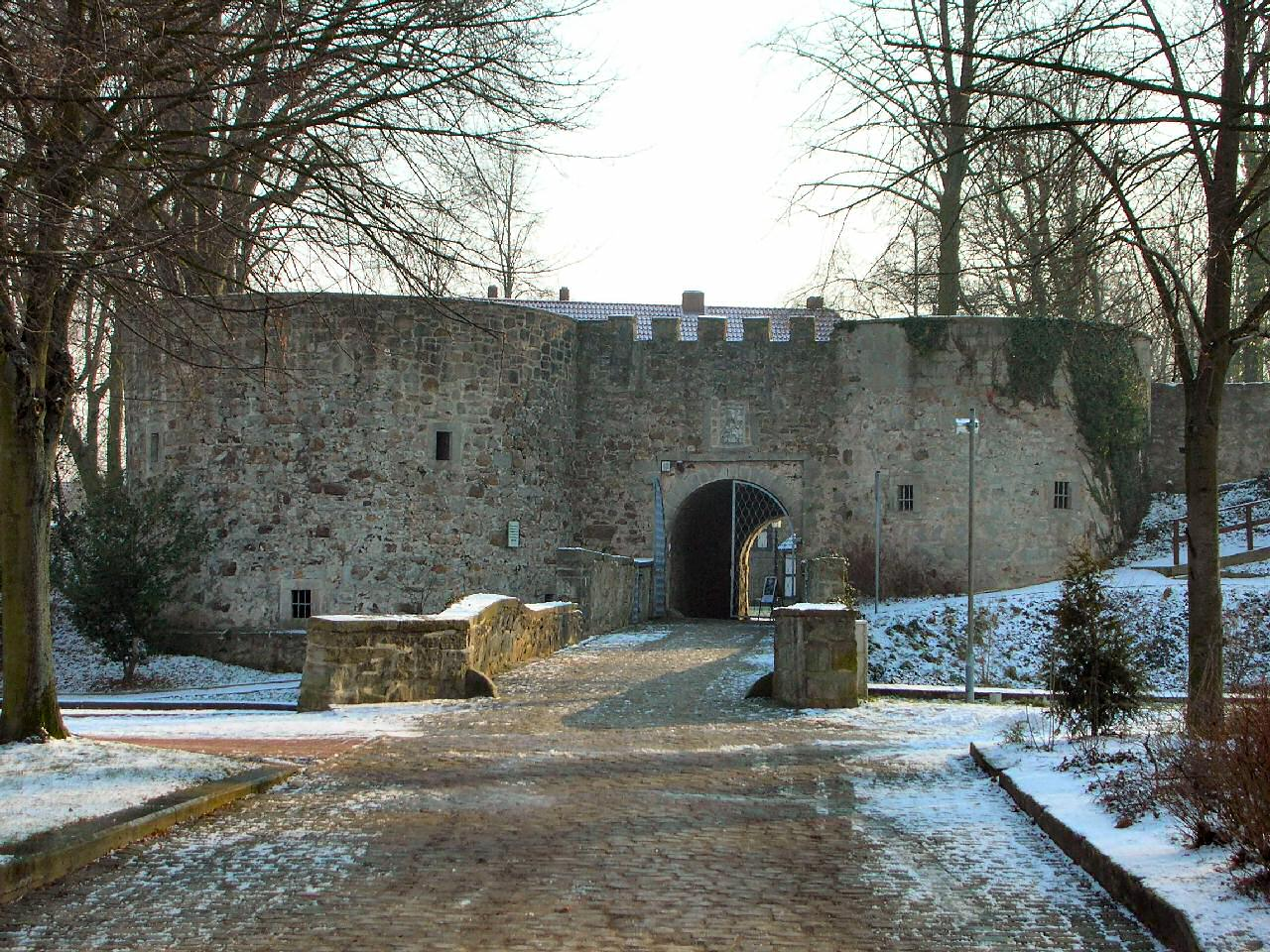 Die Burgruine in Coppenbrügge